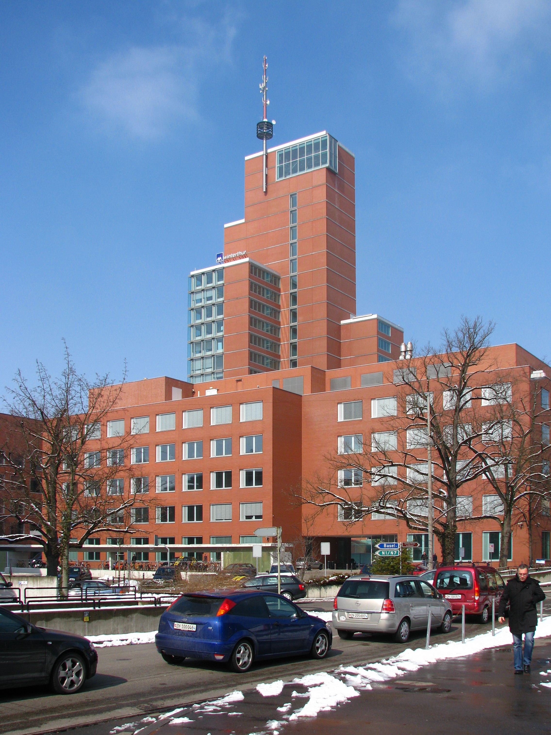 Roter Turm in Winterthur